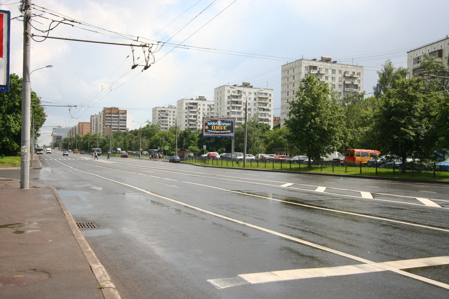 бульвар Яна Райниса, вид от пересечения с Туристской улицей в сторону Сходненской улицы